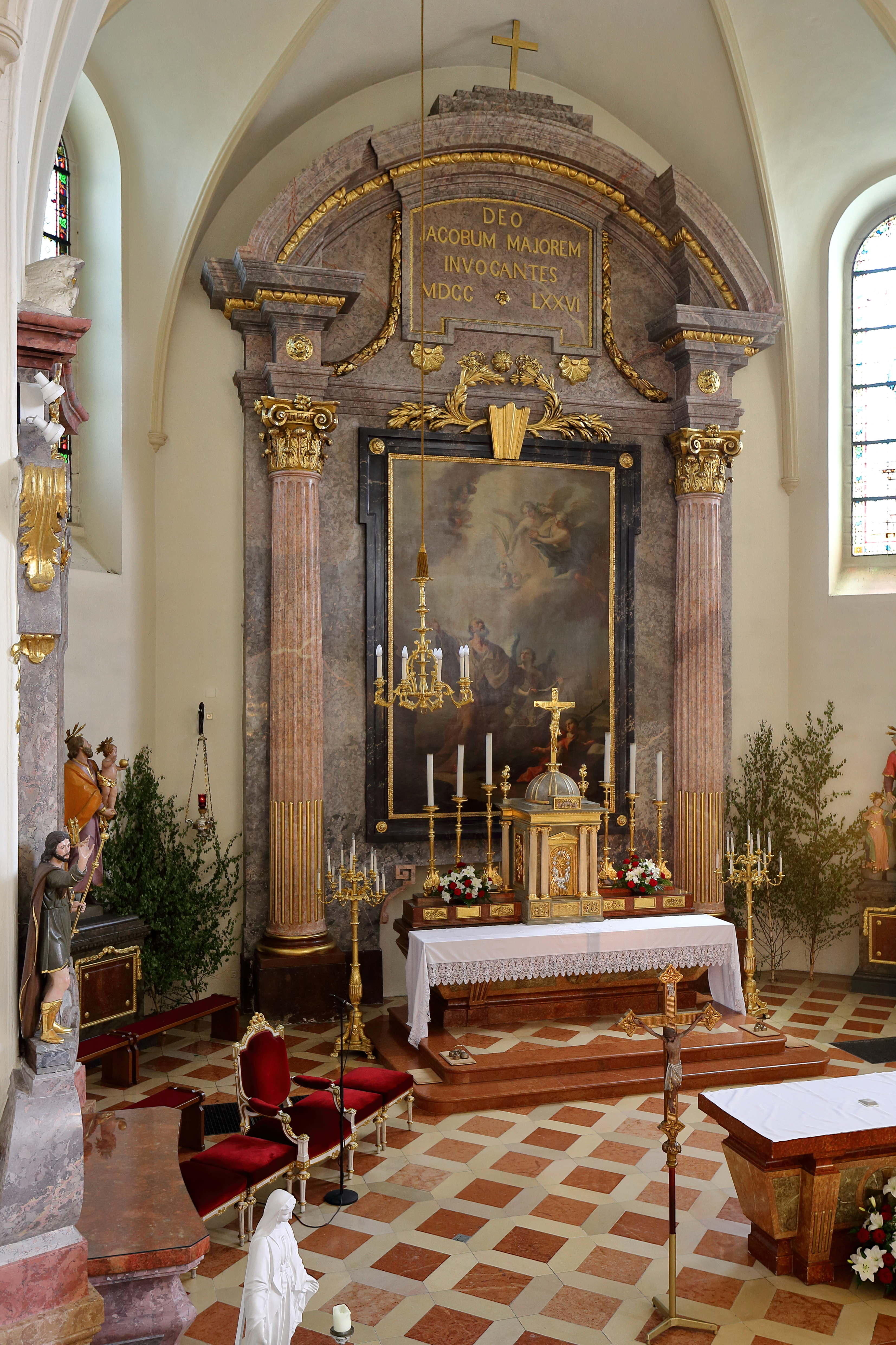 Hochaltar der Penzinger Pfarrkirche St. Jakob im 14. Wiener Gemeindebezirk Penzing.Der Hochaltar aus dem Jahr 1776 ist eine Stiftung von Erzbischof Kardinal Graf Christoph Anton von Migazzi. Das Altarbild stammt aus der Schule des Barockmalers Franz Anton Maulbertsch und zeigt den hl. Jakob den Älteren.